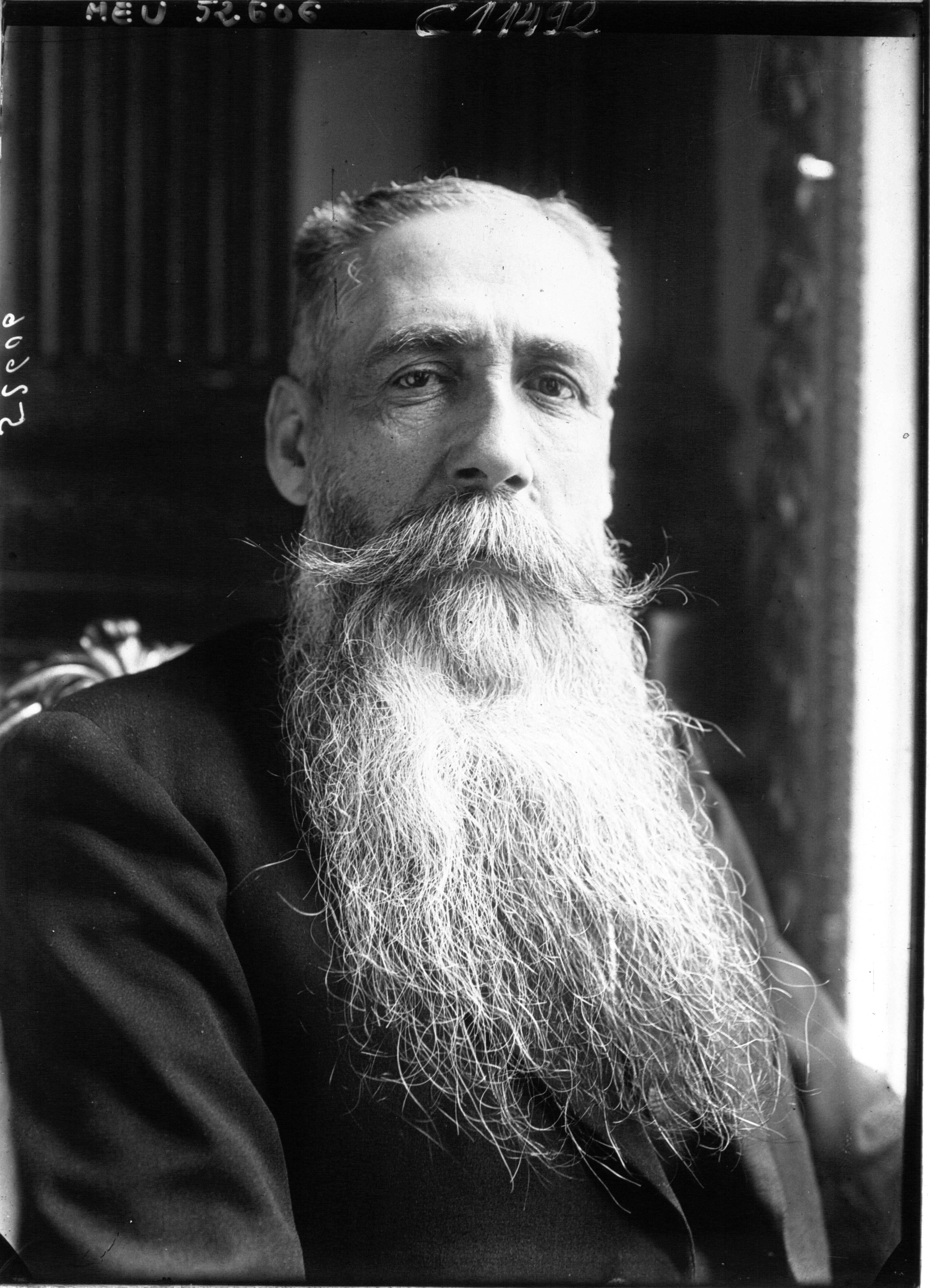 Mr Abel, député du Var, avocat à la Cour : photographie de presse